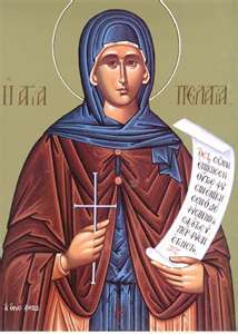 Santa Pelágia, a Penitente